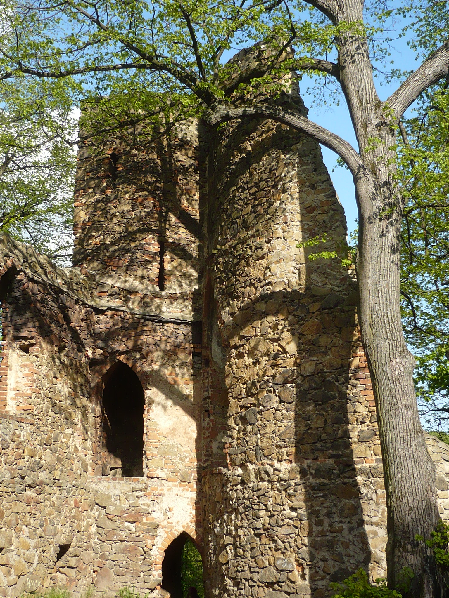 Stary Książ